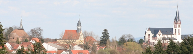 Worms-Horchheim Blick auf die drei Kirchen (April 2010)